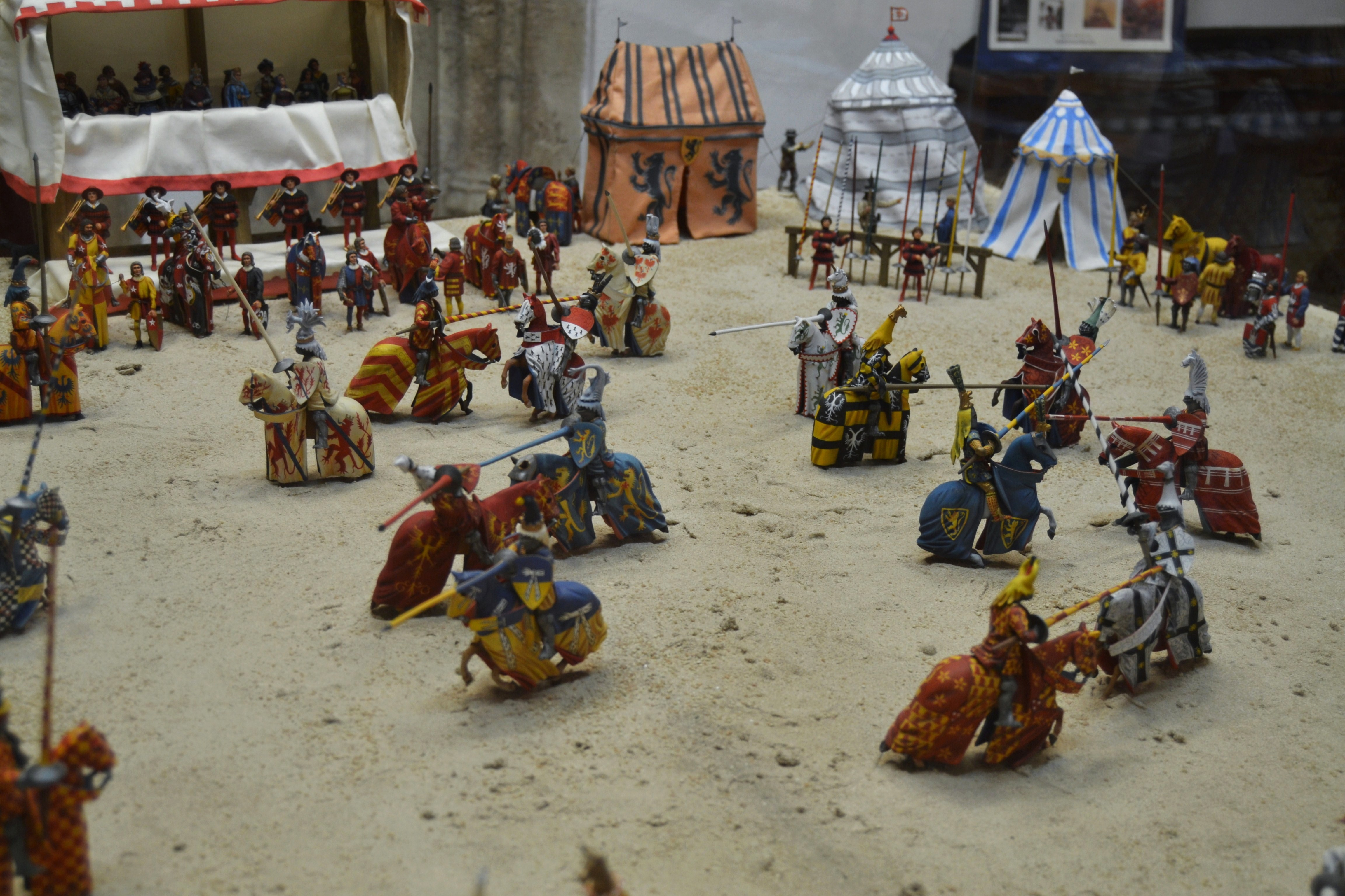 Torneig d'Oxford narrat al Tirant lo Blanc, museu dels soldadets de plom l'Iber, València.